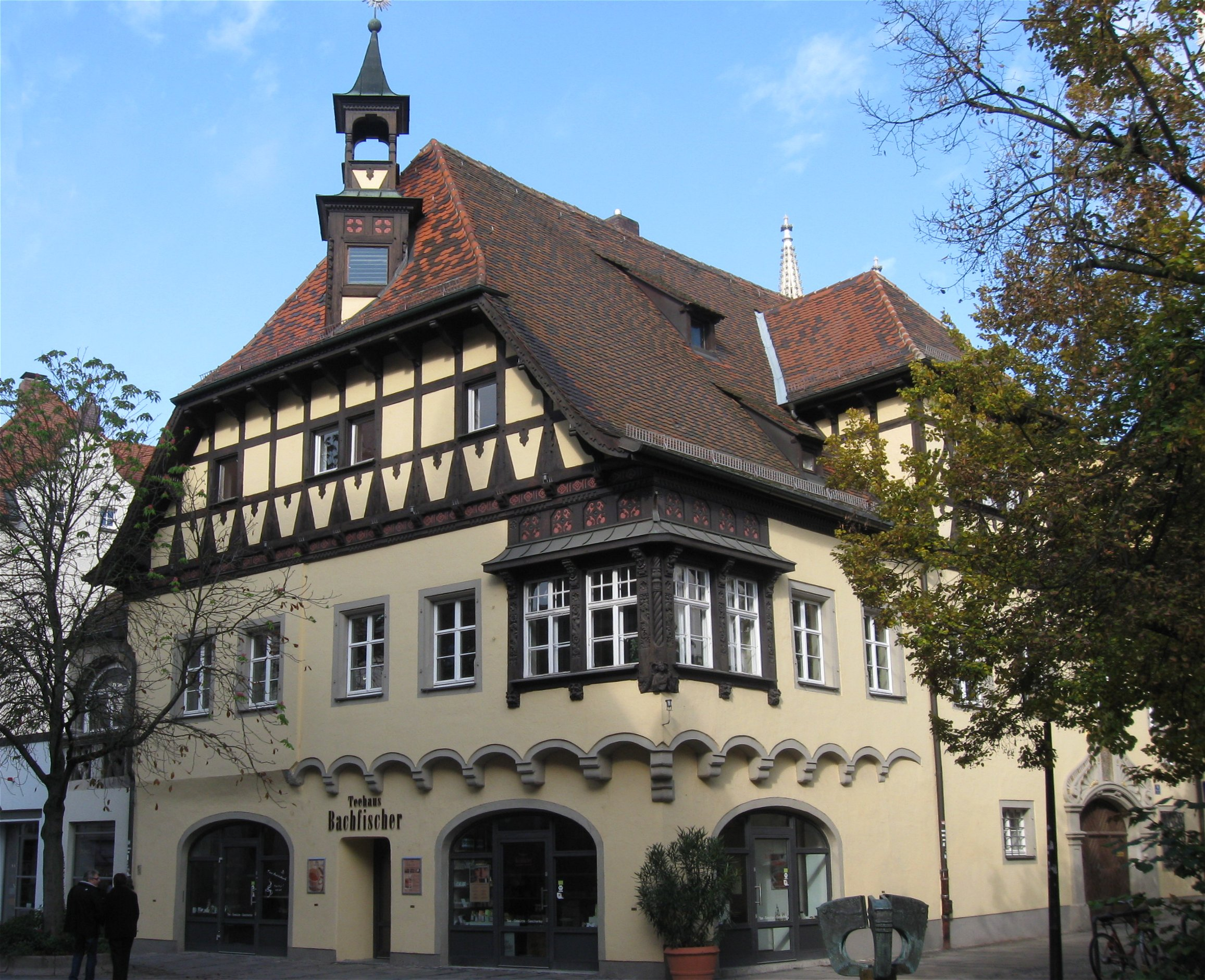 Kapellengasse 6; Alte Dechantei der Alten Kapelle, zweigeschossiges, zur Kapellengasse traufständiges Halbwalmdachhaus in Ecklage, spätgotisch, mit Fachwerk, Eckfenstern mit Fußwalm und Zwerchhaus von 1905/06, Relief der Muttergottes mit Kind, spätgotisch, bez. 1464.